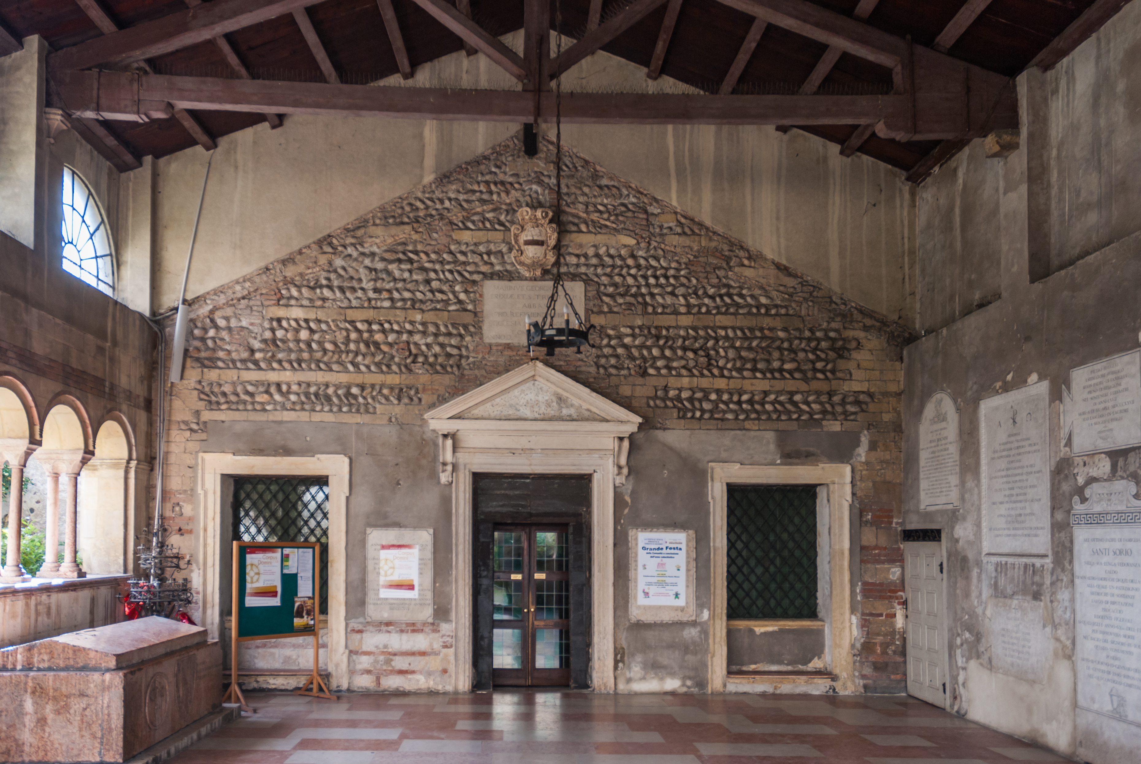 Atrio della chiesa Santissima Trinità a Verona